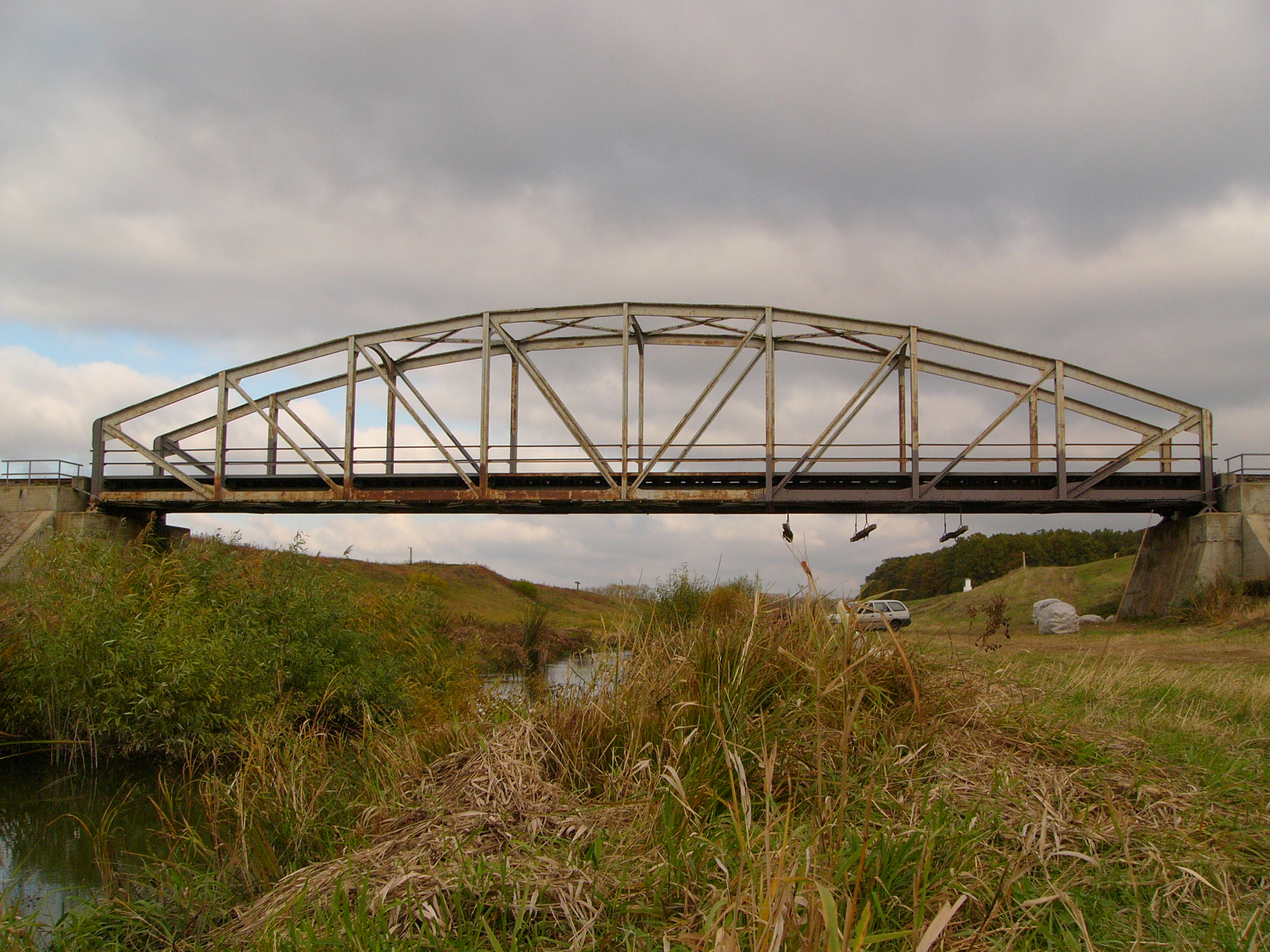 Jászdózsa "Vashíd"